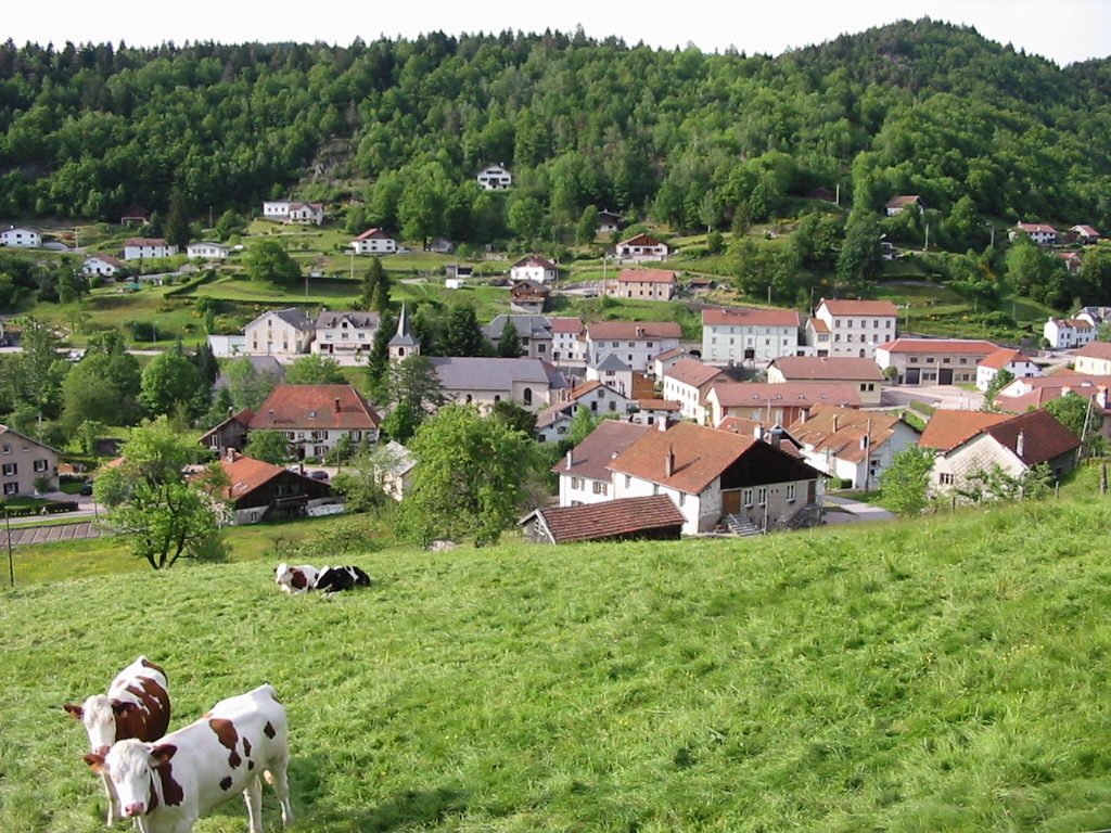 Rochesson Commune du département des Vosges. Vue prise du lieudit Les Combes. Photo personnelle du 7 juin 2006. Copyright © Christian Amet